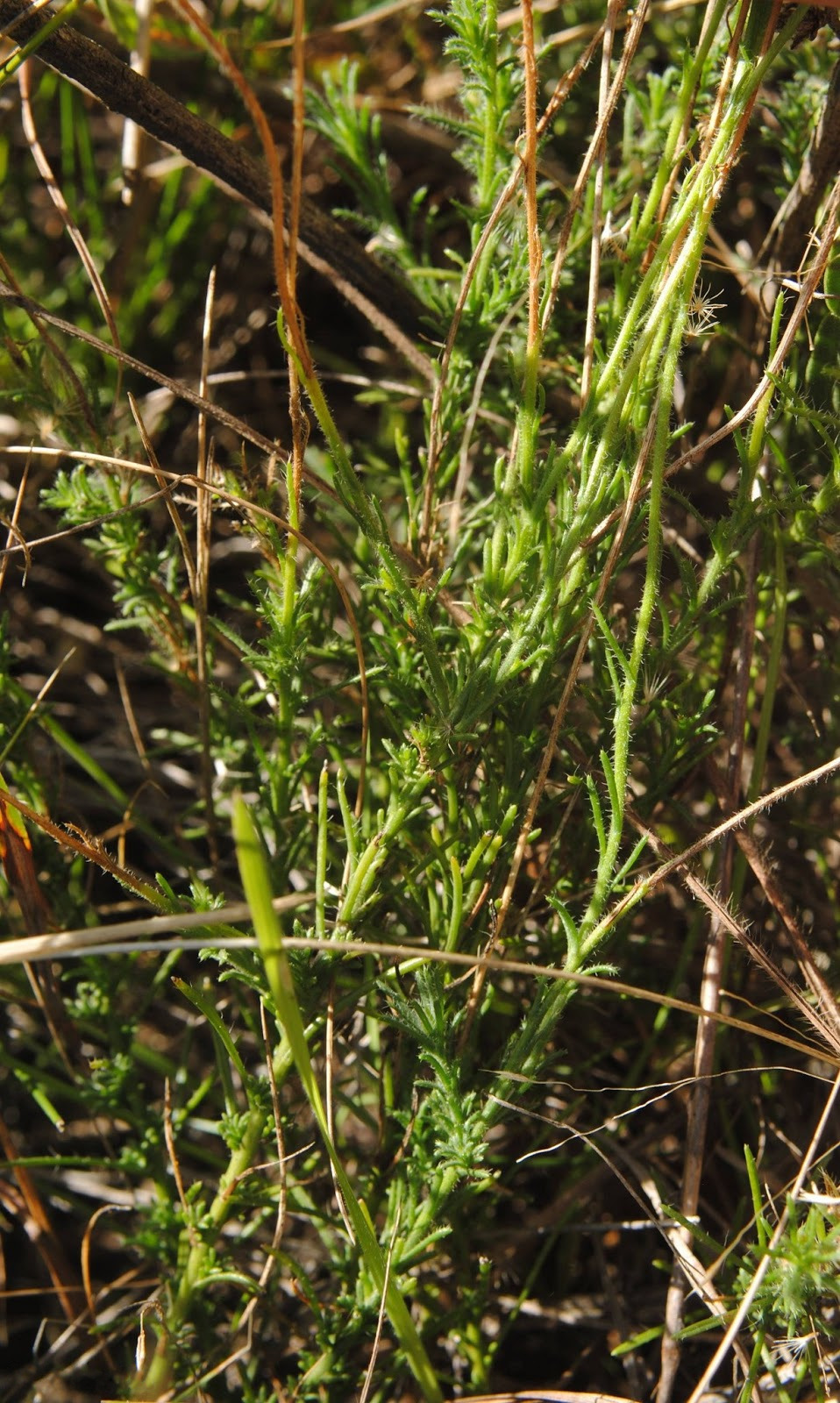 Hysterionica filiformis. Asteraceae. Fotos tomadas entre gramíneas en suelo pedregoso al margen de camino hacia la Quebrada de los Cuervos, departamento de Treinta y Tres, Uruguay.